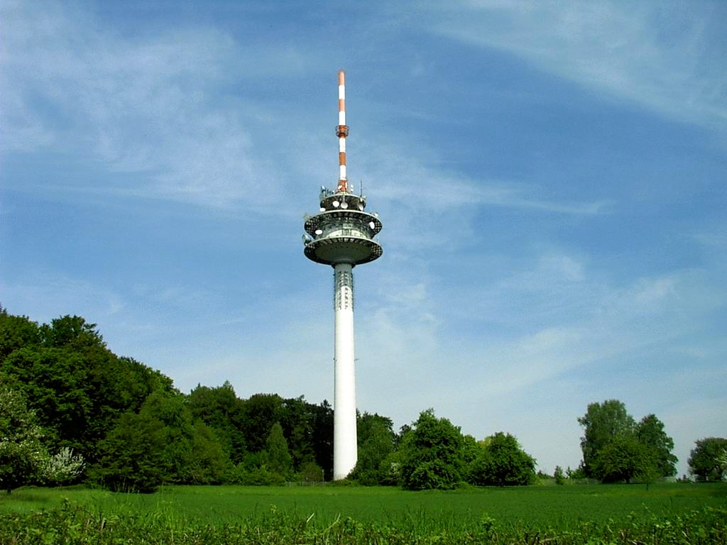 Fotografie des Fernmeldeturmes bei Grünwettersbach